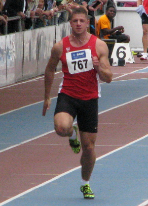 Alex Schaf beim DLV WM-Testwettkampf 2011 im Stadion der MTG Mannheim.